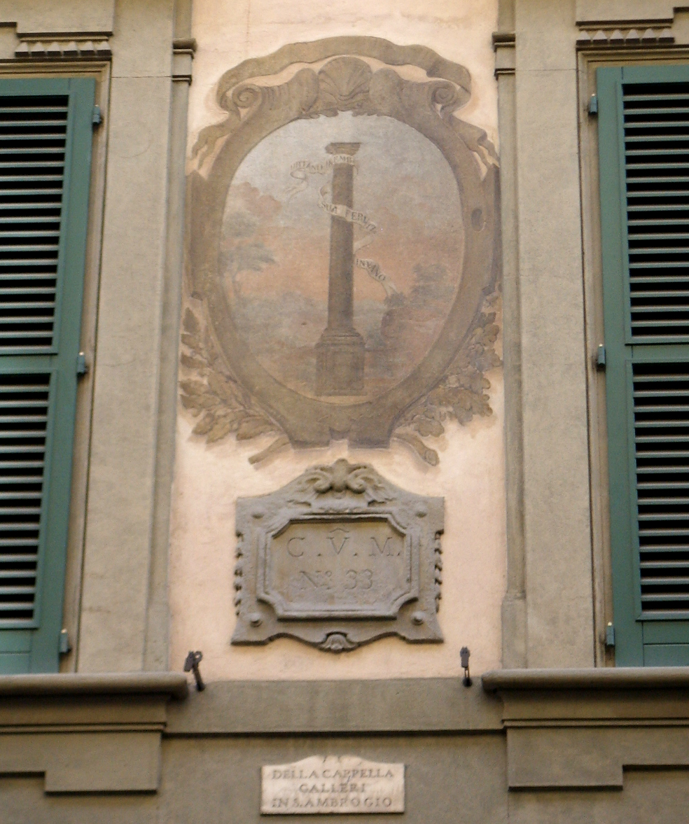 Via_bufalini,_stemma in Florence